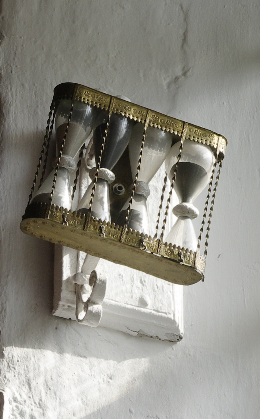 Kulturdenkmale in Erfde Nummer 1 /Zähler 1